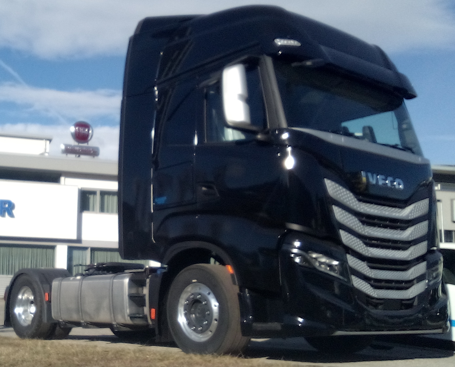 Seitlich